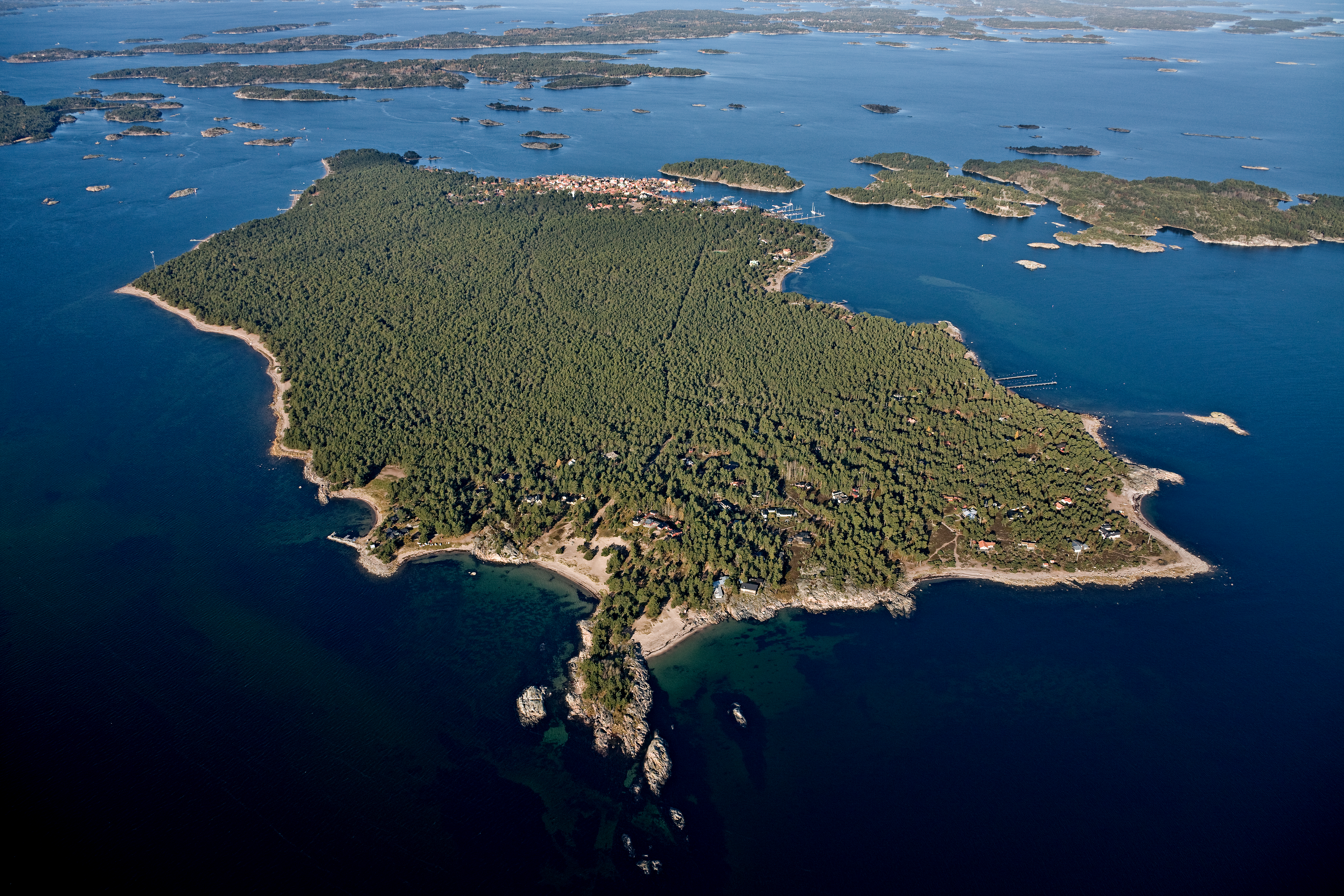 Mot N. Trovill och Brynteskobbarna nertill i bild, högst upp Sandhamn. Motiv: Sandön Nyckelord: Flygbilder, Riksintressen Kategori: Kust- och skärgårdsmiljö Mot N. Trovill och Brynteskobbarna nertill i bild, högst upp Sandhamn.